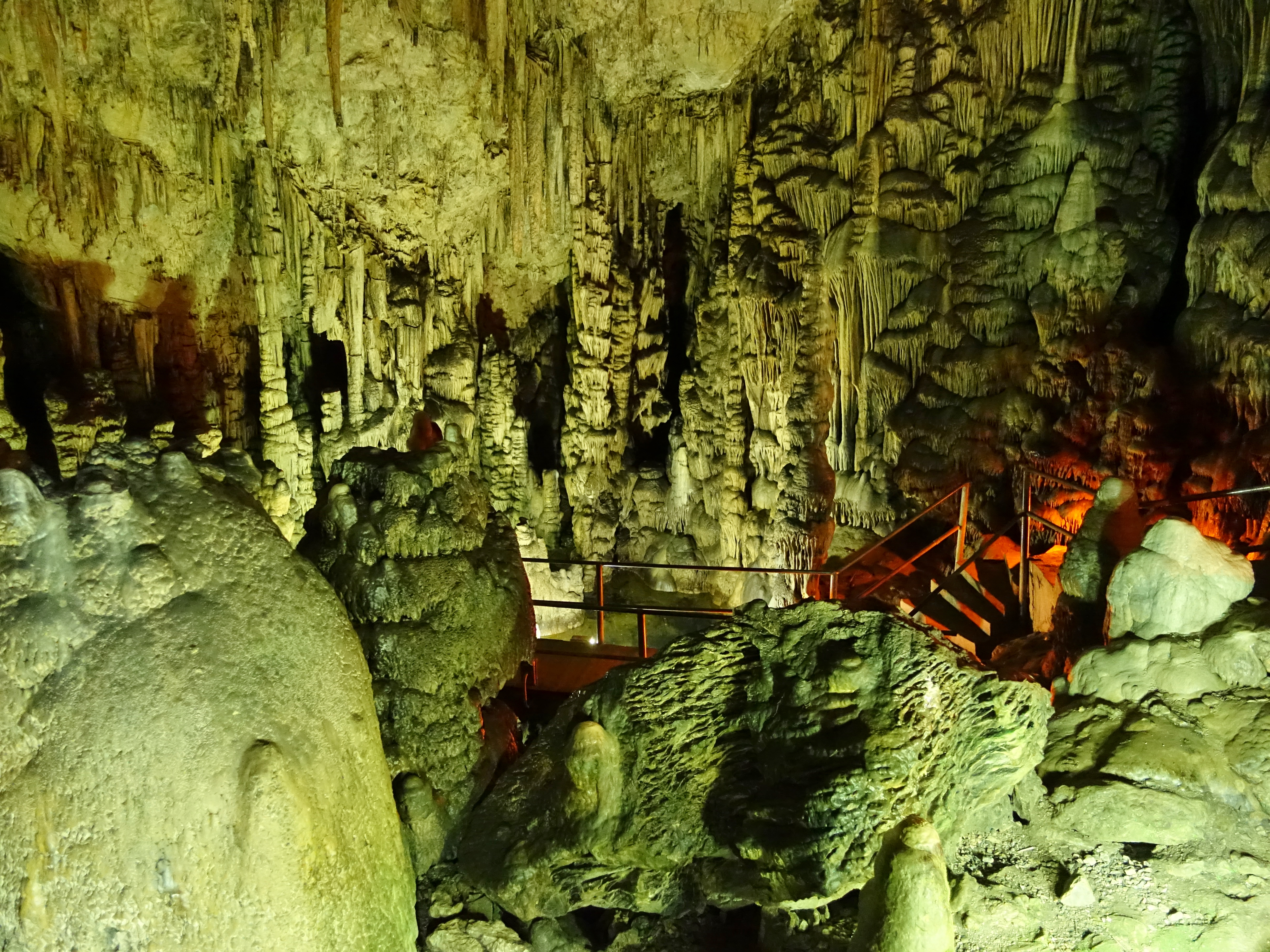 Diktäische Grotte (Δικταίον Αντρον) bei Psychro (Ψυχρό), Regionalbezirk Lassithi, Kreta, Griechenland